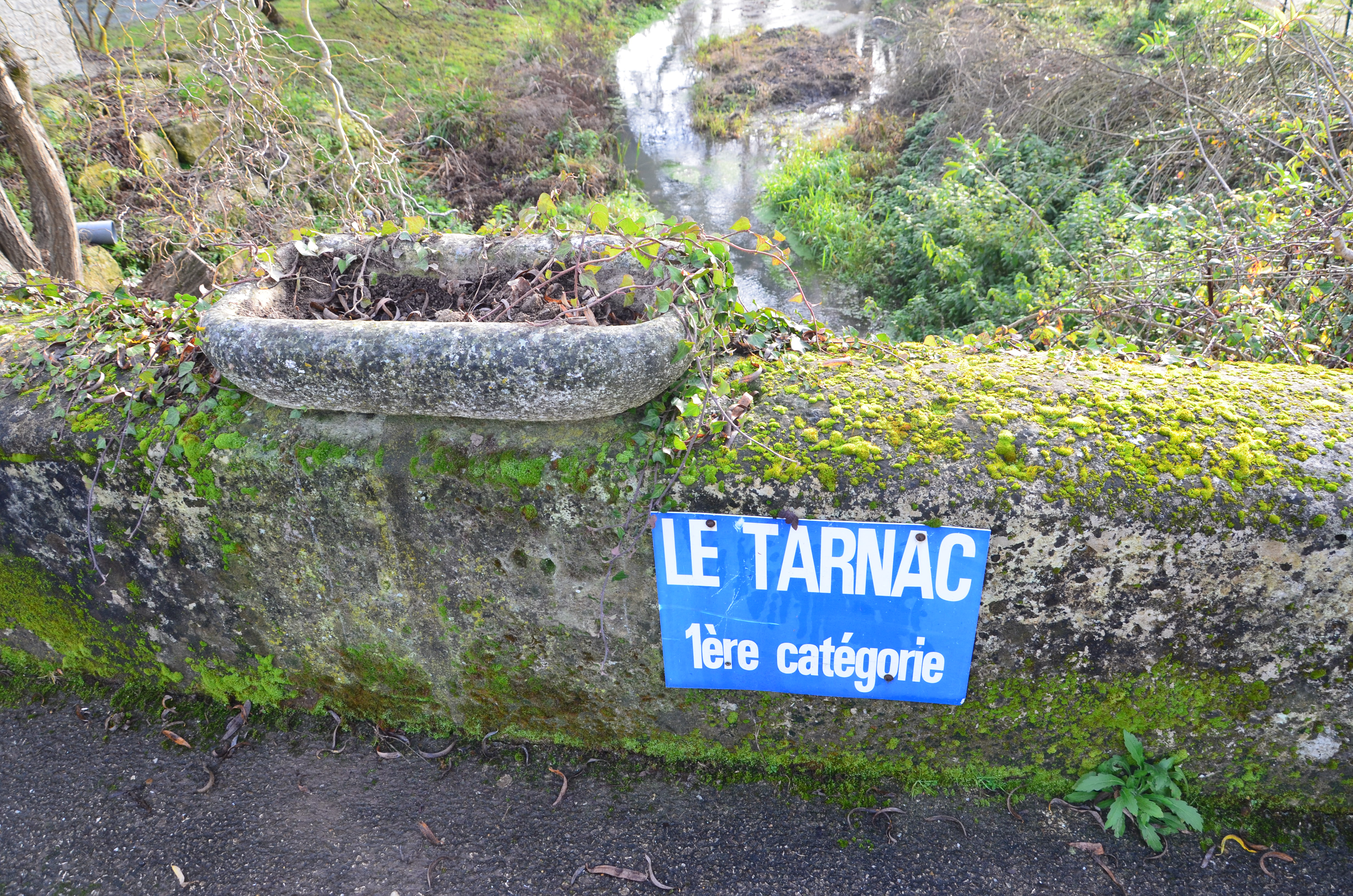 le Tarnac